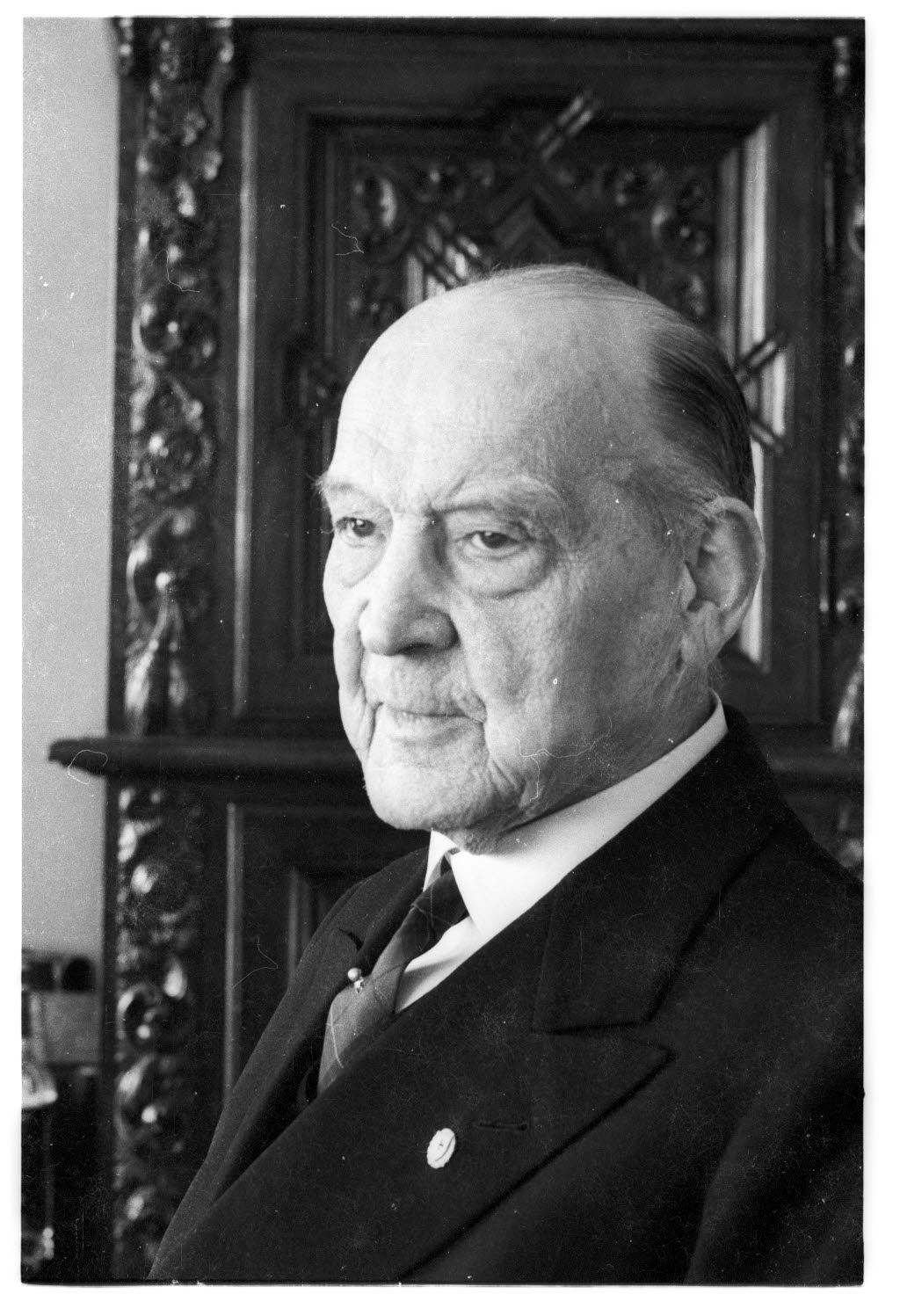 Der ehemalige Chef der Marinestation Ostsee (1928 bis 1932) wird 85 Jahre.